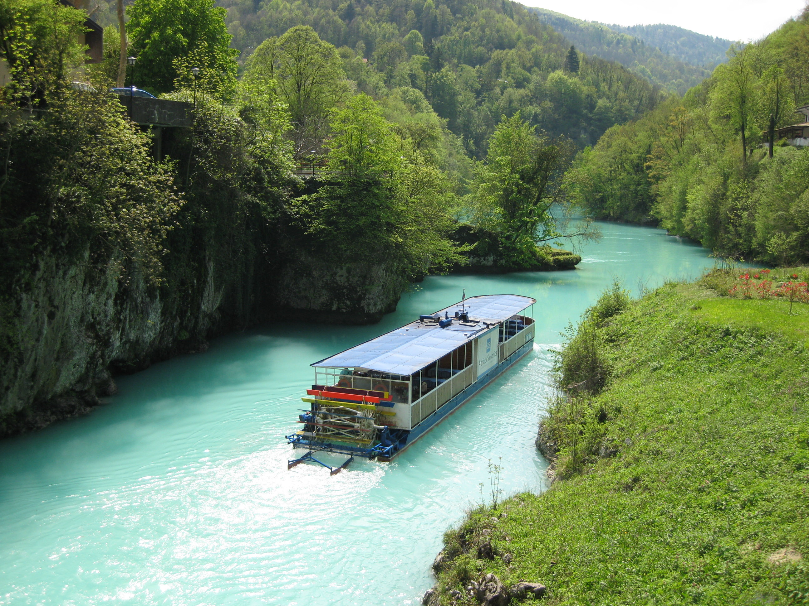 Boat on river Soča at Most na Soči, Slovenia